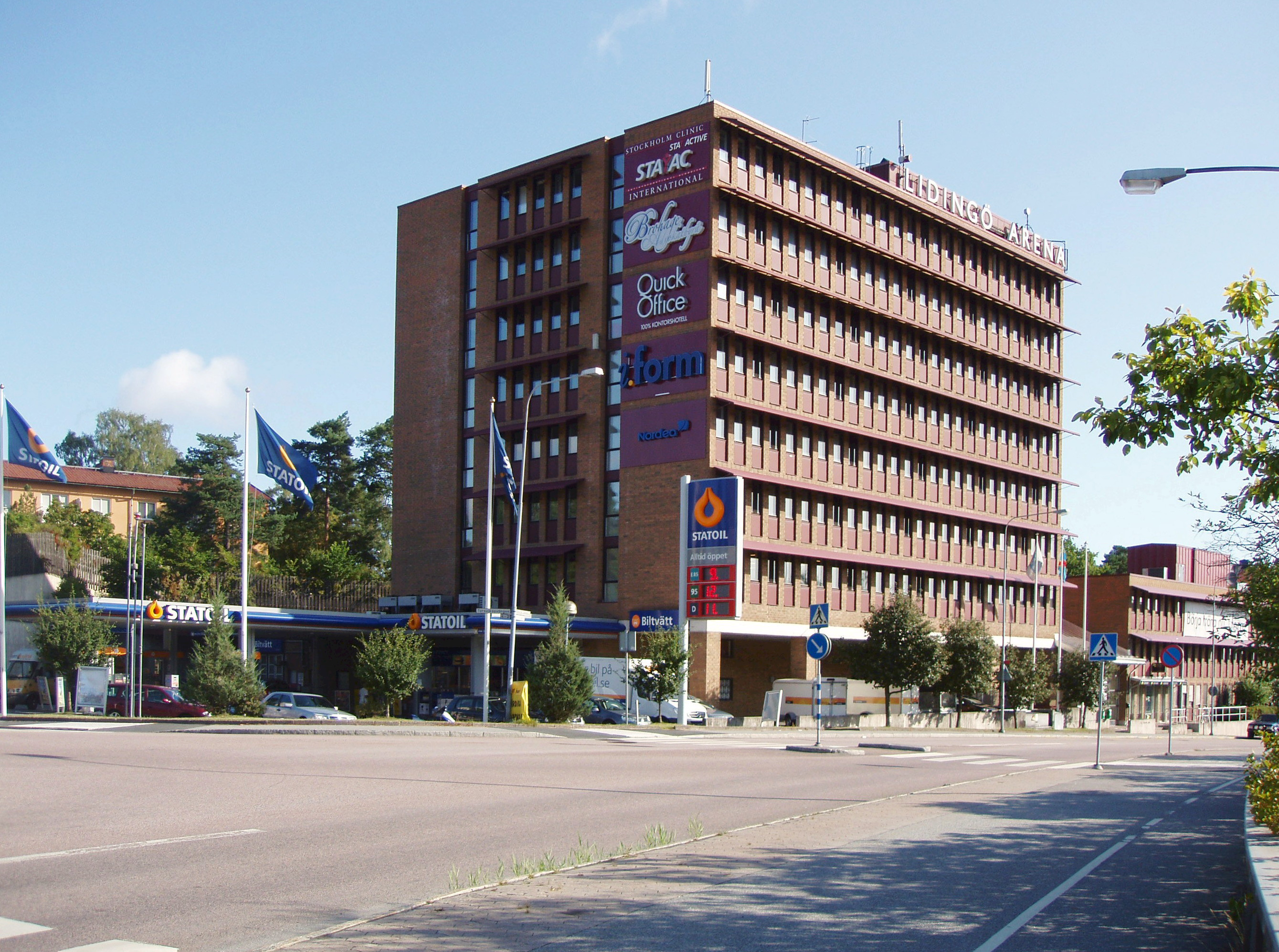 Fastigheten Lidingö Arena på den norra sidan av Stockholmsvägen i Torsvik på Lidingö.